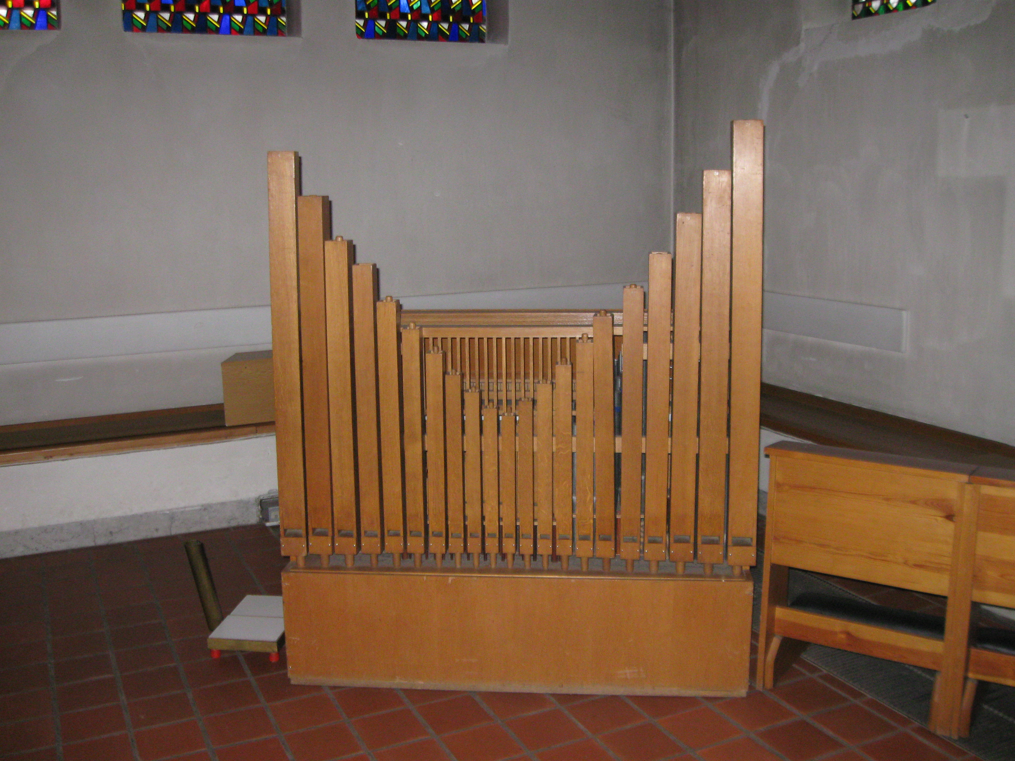 Das Walcker-Positiv in der St.-Josef-Basilika Lingen (Ems)